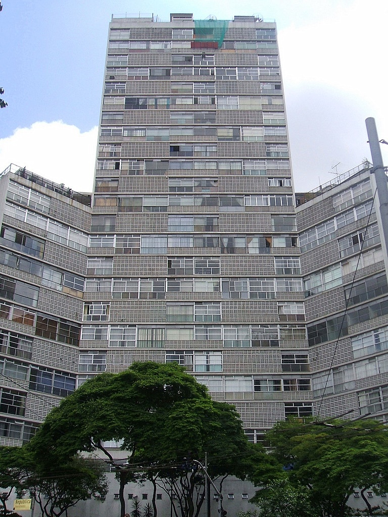 Edifício Eiffel, projeto de Oscar Niemeyer (1953); Praça da República, centro da cidade de São Paulo, Brasil.